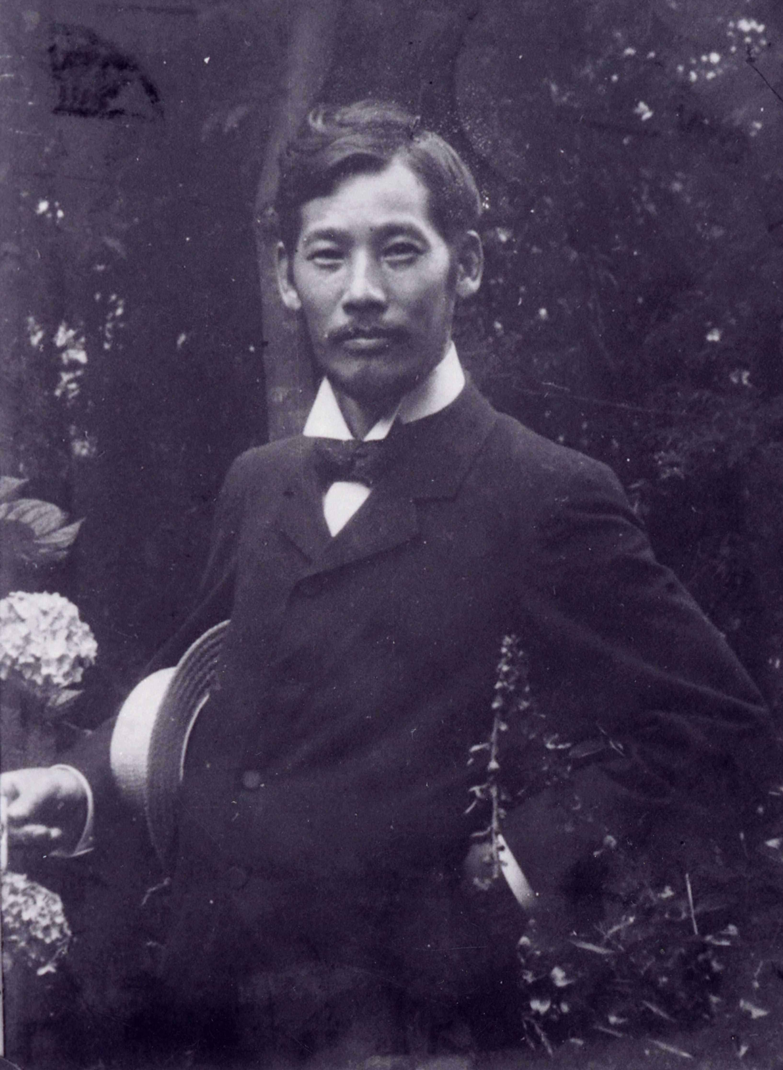 a Japanese painter, 岡田三郎助 (Okada Saburosuke)